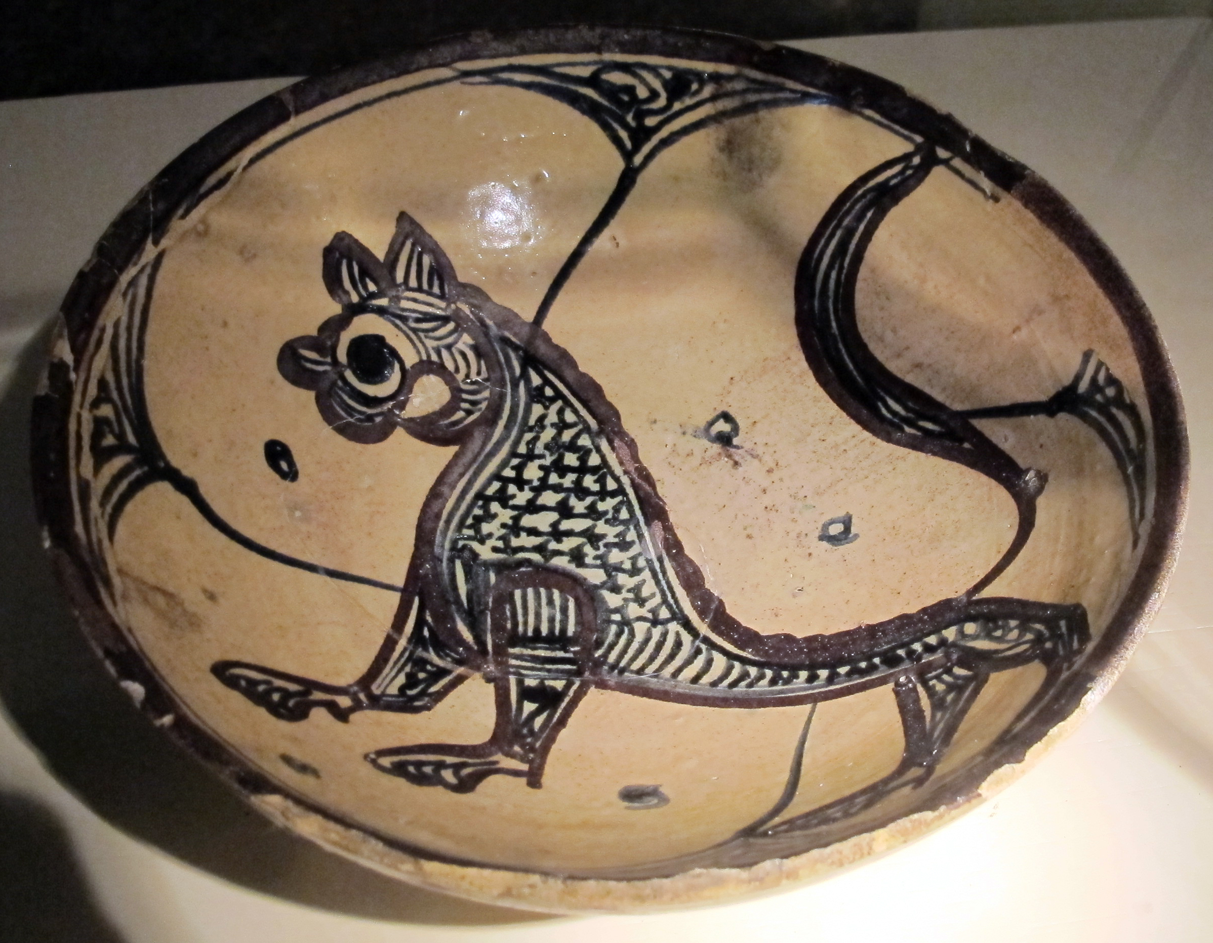 Manifattura tunisina, ciotola con felino 2, 1165-1220 ca., da mus. diocesano s. miniato